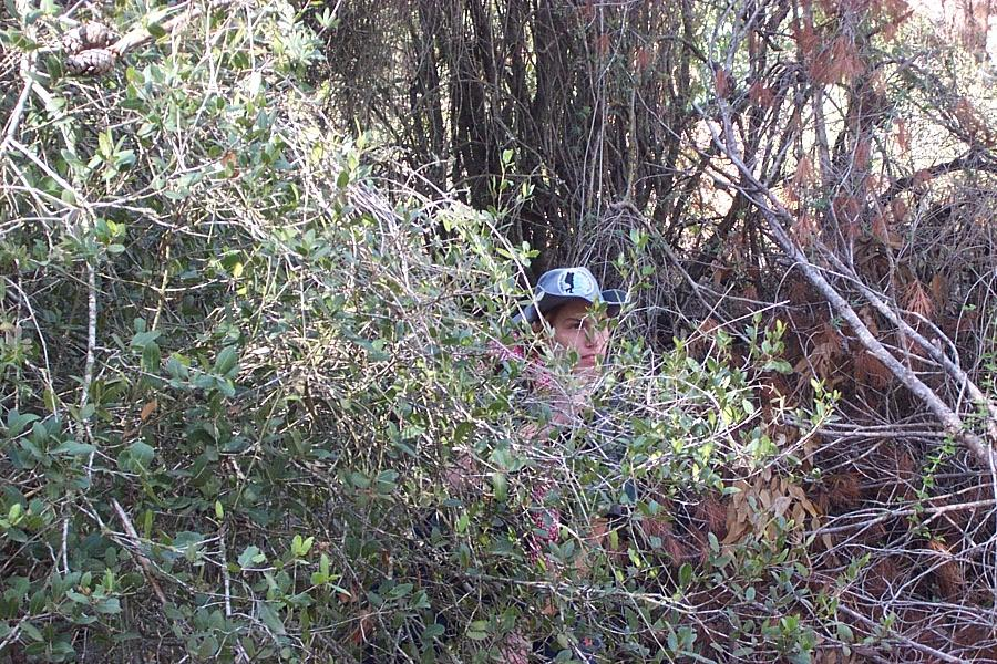 Hide and Seek